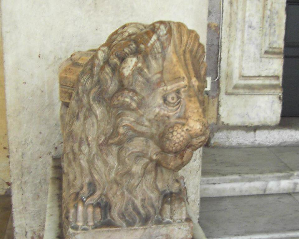 Roma, Basilica dei Santi Apostoli: leone all'ingresso, firmato dal Vassalletto (salvato dalla basilica medioevale)